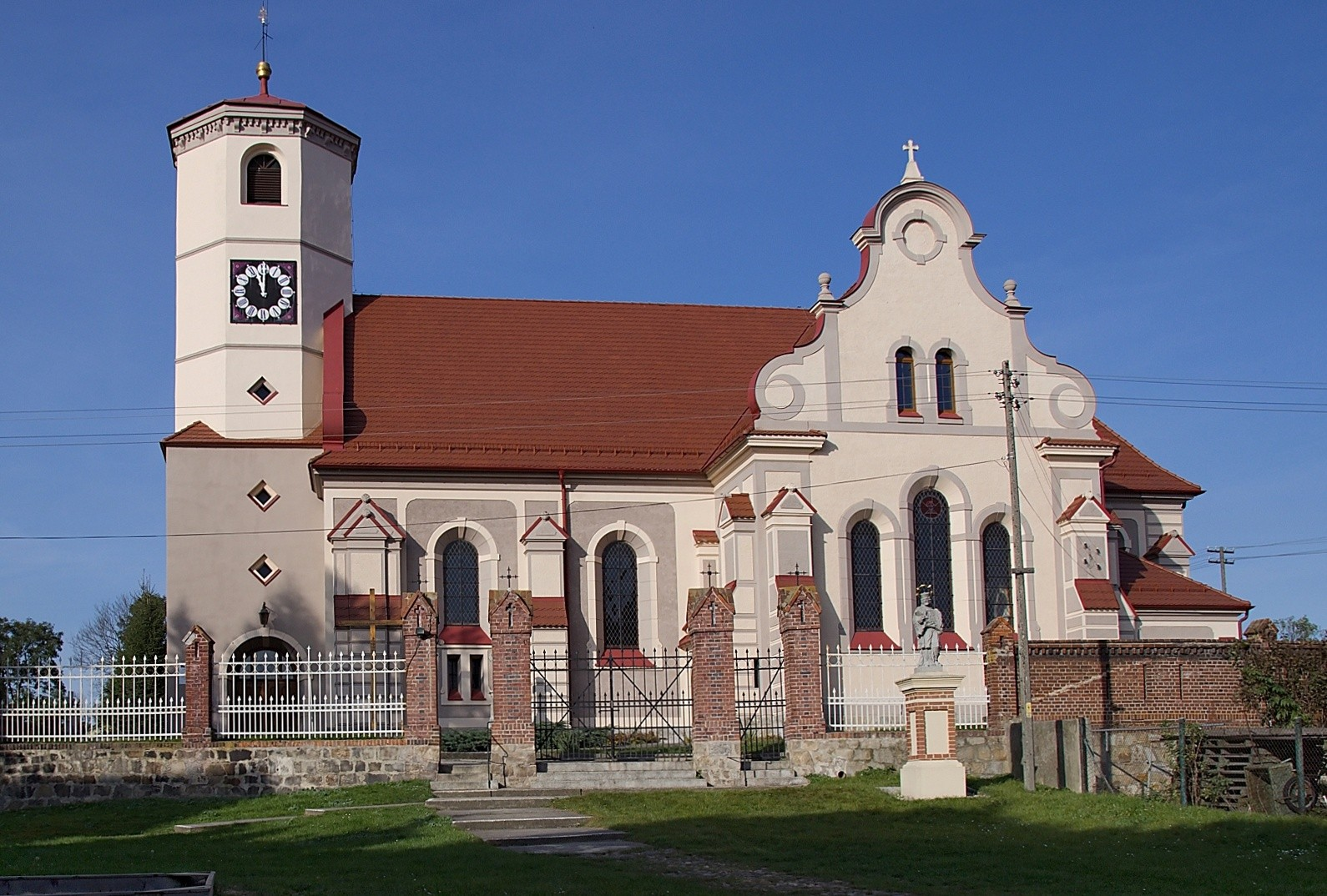 Rusocin - rzymskokatolicki kościół parafialny p.w. św. Klemensa (nr 66), 1897